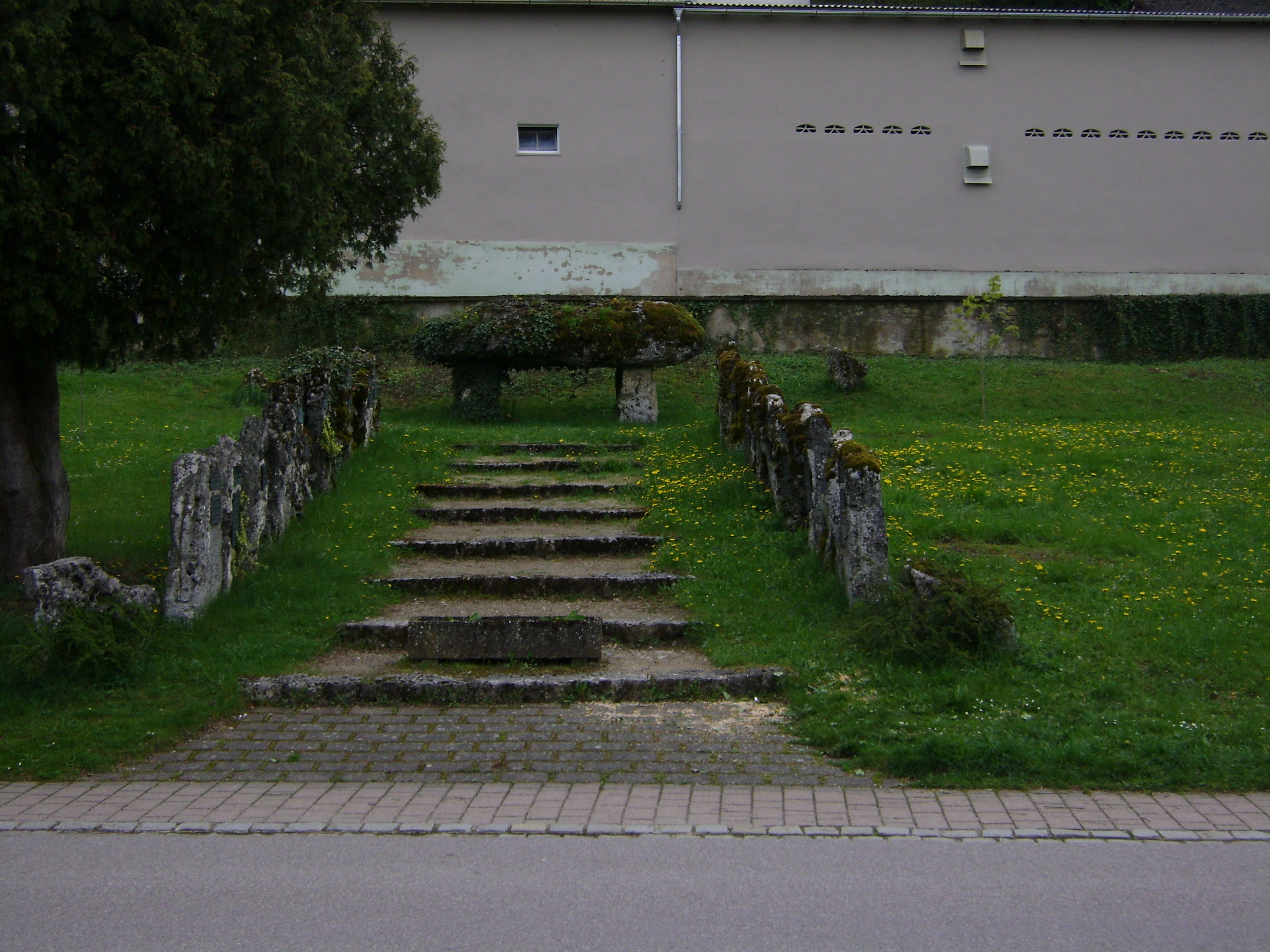 Kriegerdenkmal in Solnhofen This is a photograph of an architectural monument.